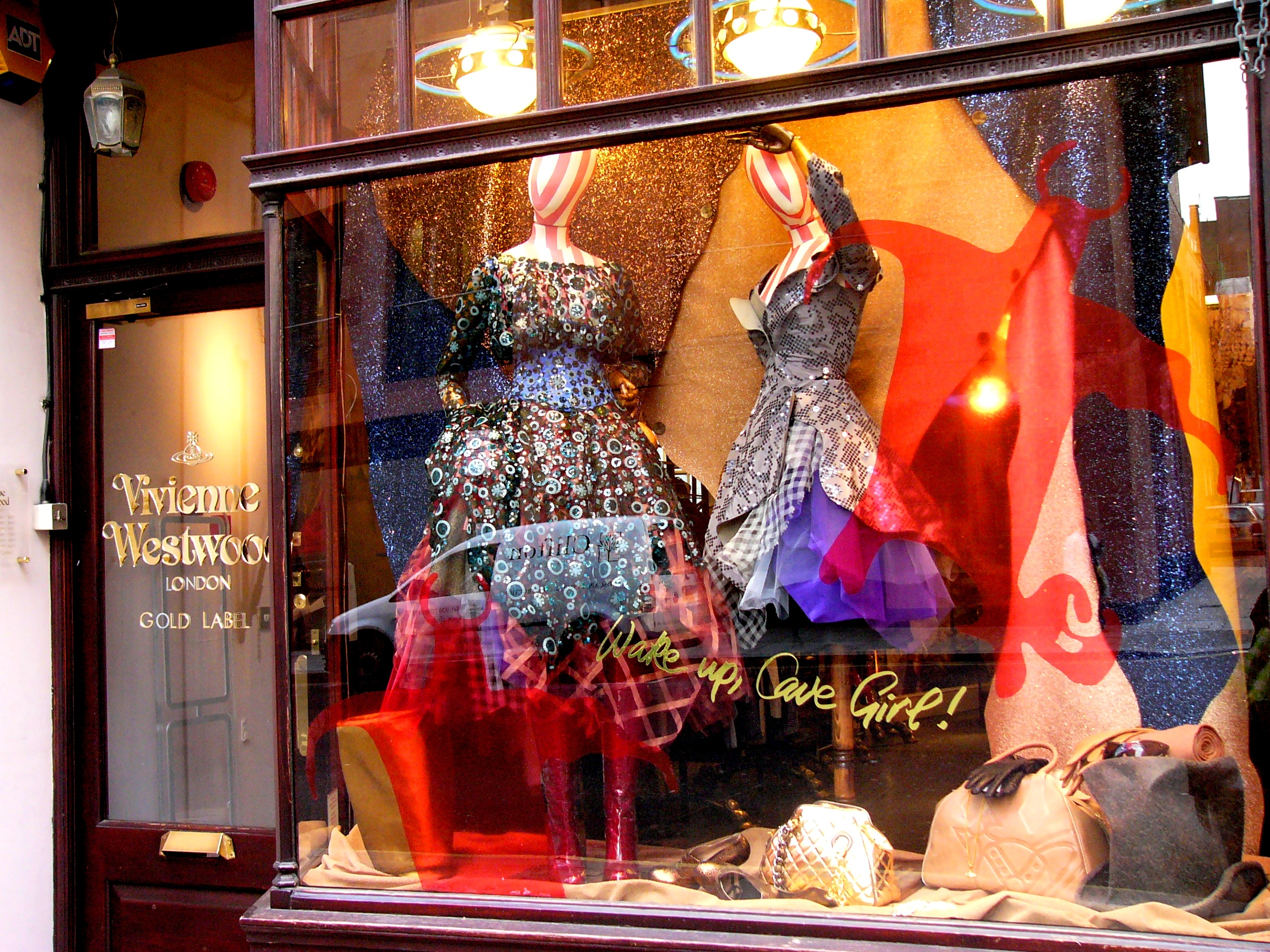 Vivienne Westwood, 6 Davies Street, London W1K 3DN